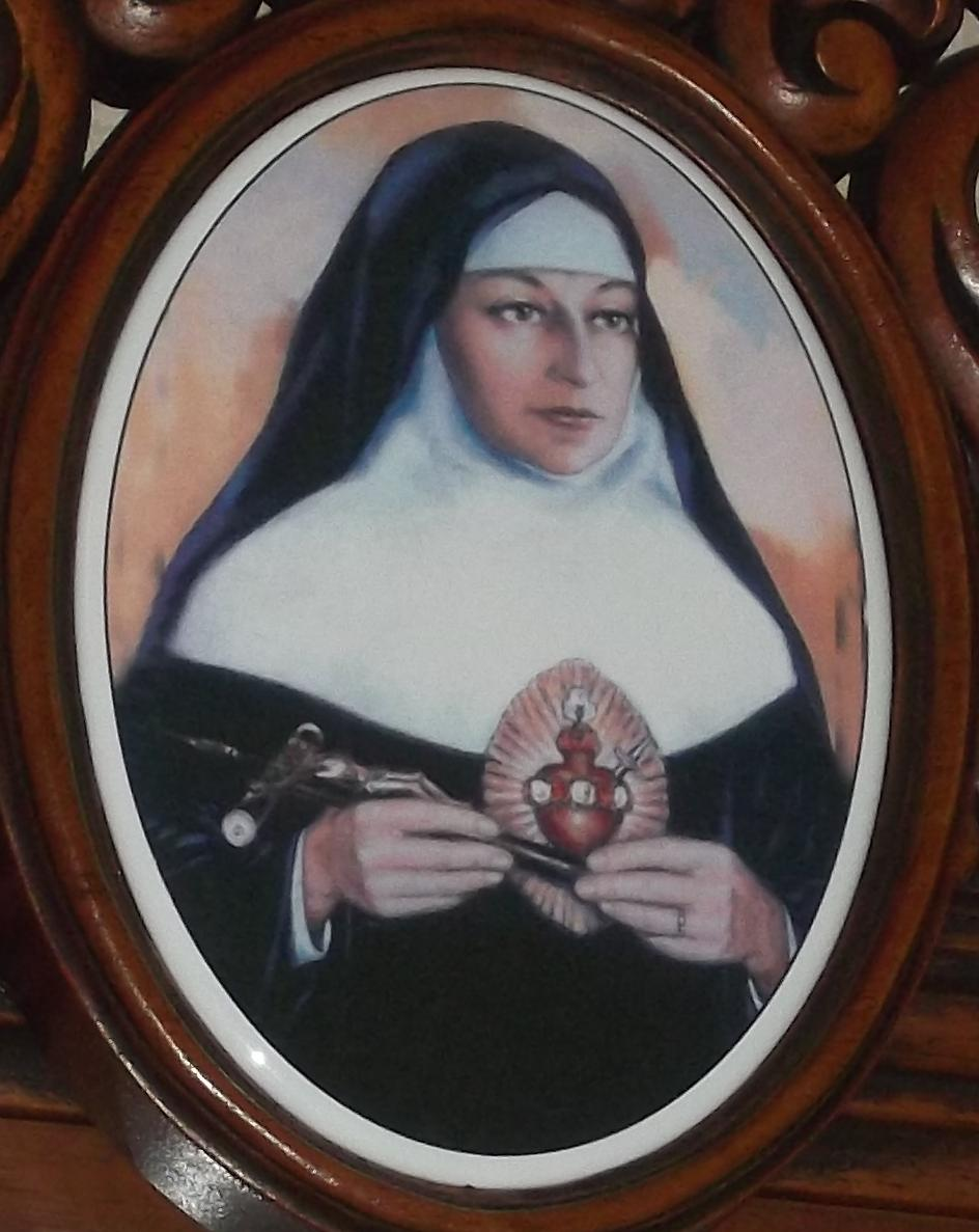 Detalhe das Relíquias de Barbara Maix na Igreja São Rafael em Porto Alegre, Rio Grande do Sul.